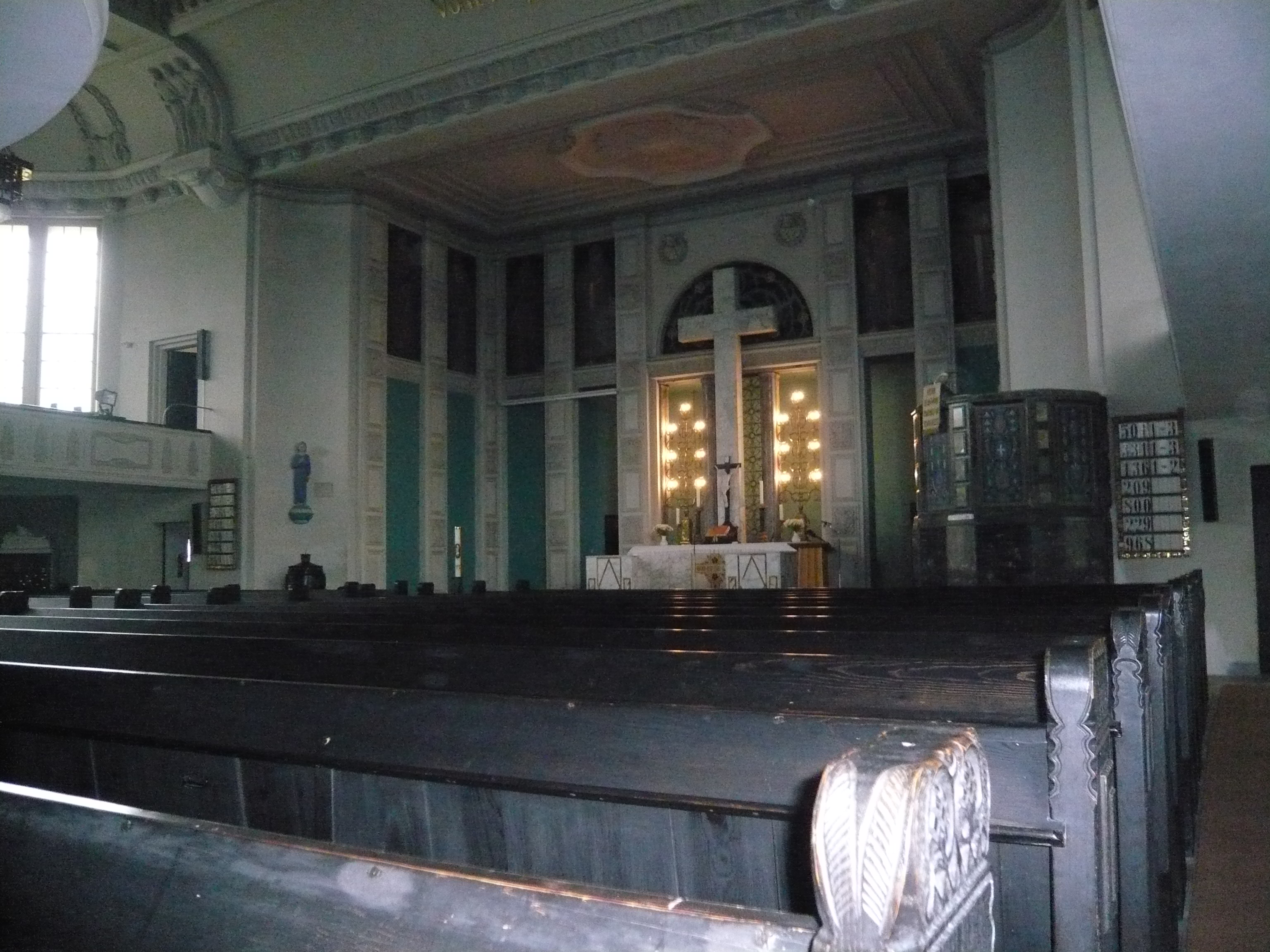 Friedenskirche in Aue-Zelle